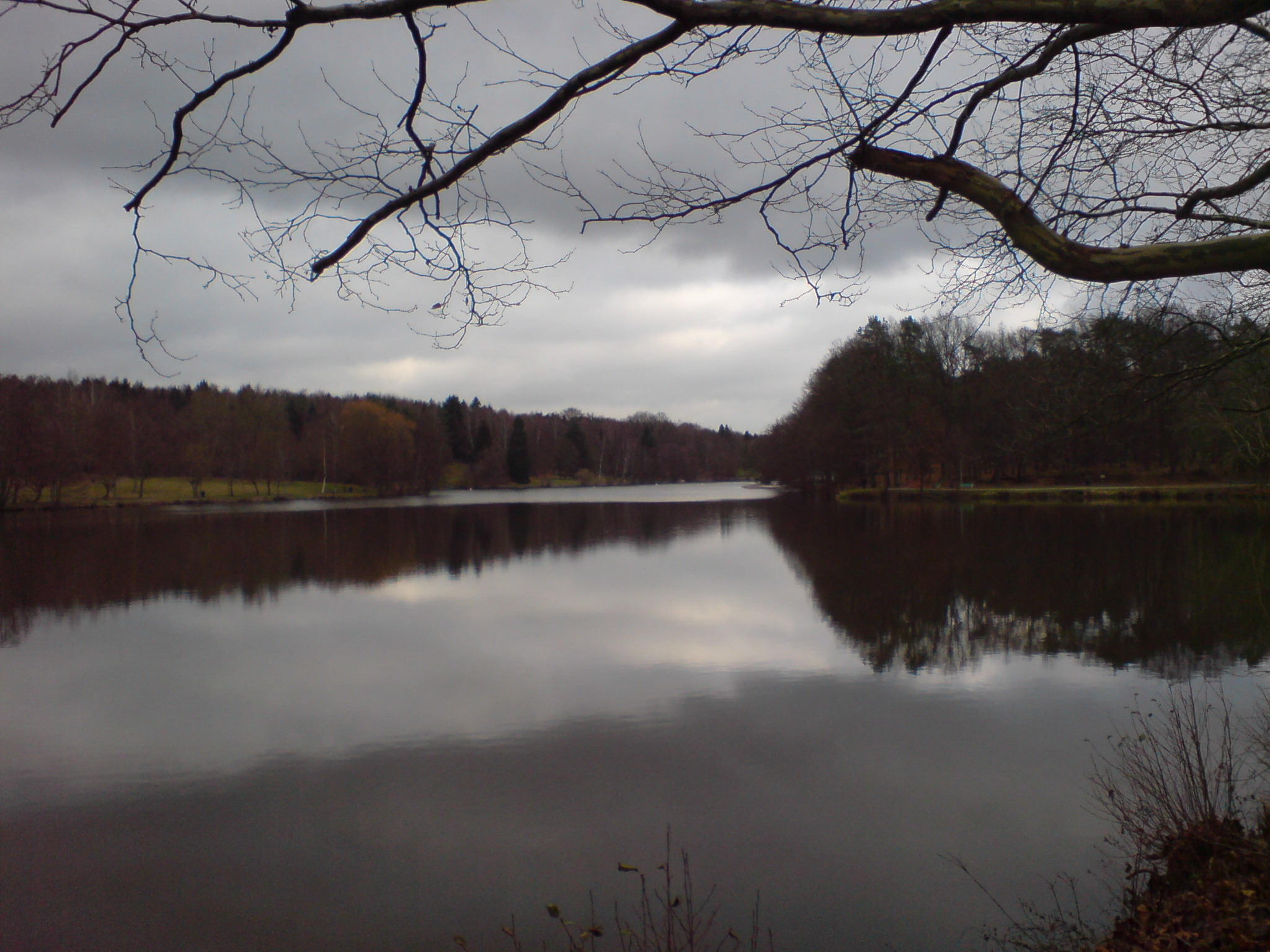 Der Brückweiher in Jägersburg (Homburg Saar)